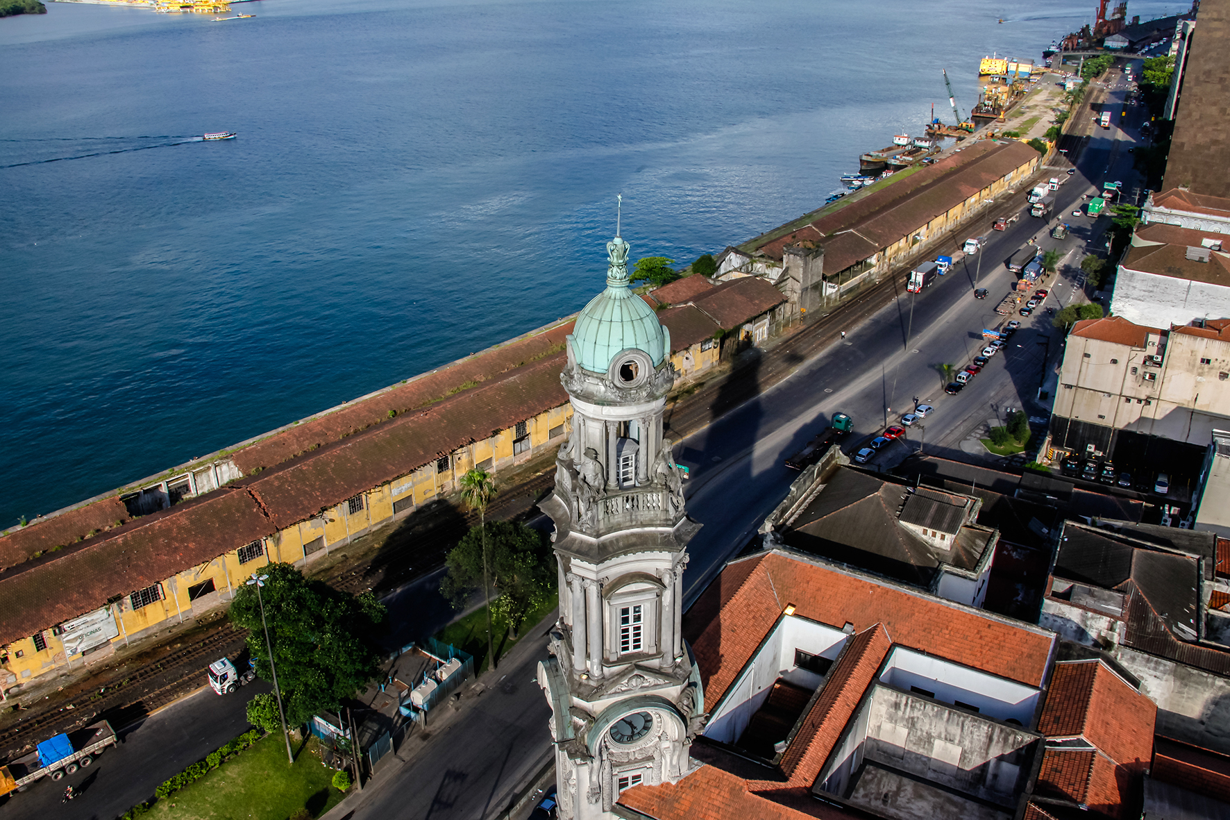 Edifício da Bolsa Oficial do Café